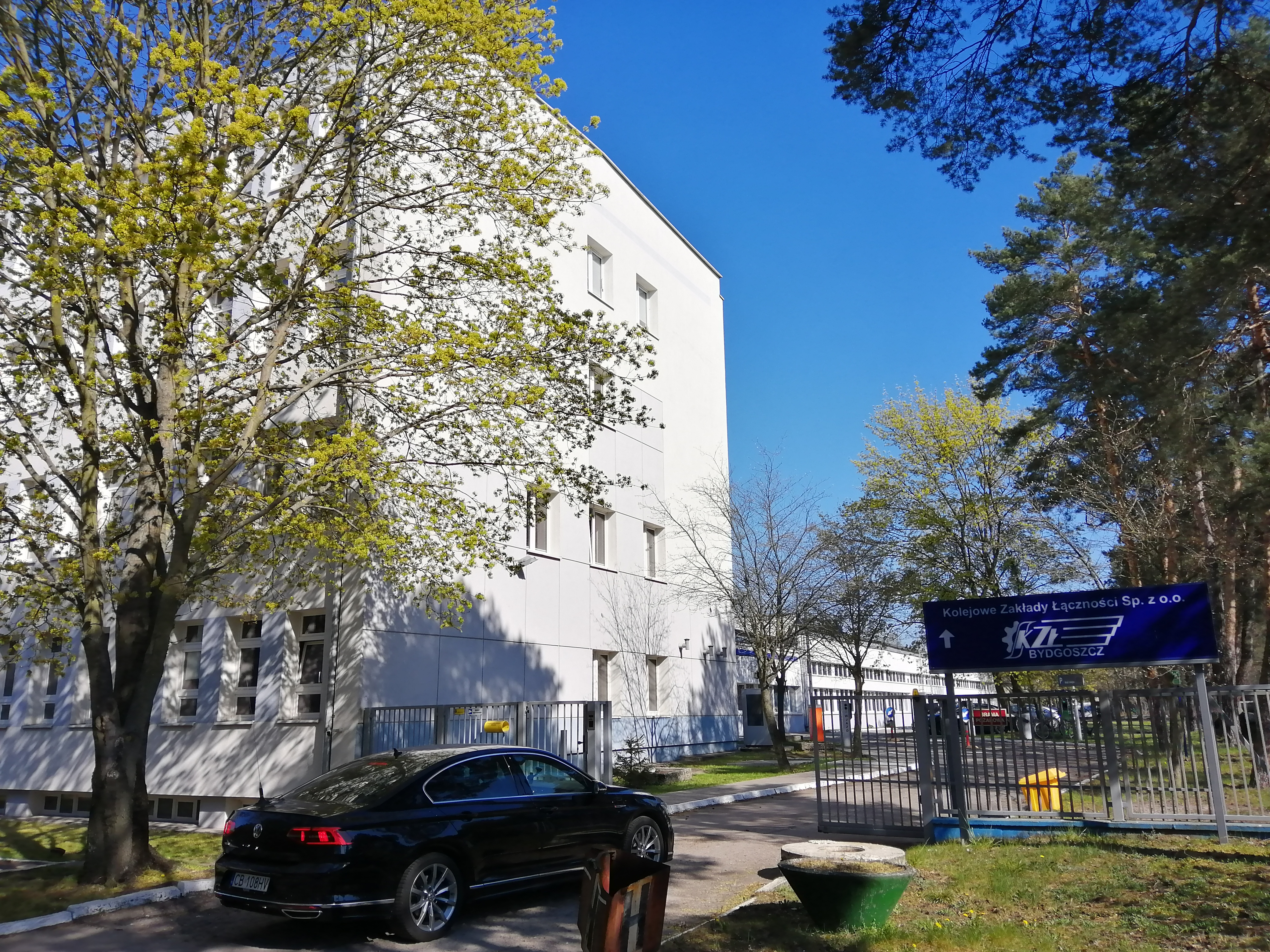 wjazd do siedziby firmy